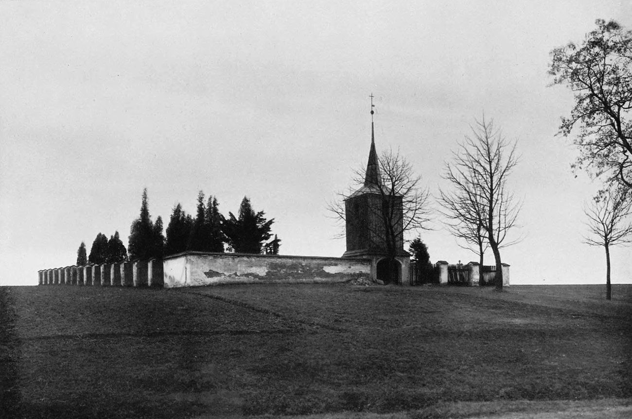 evangelischer Friedhof Riegersdorf, Kreis Neustadt O.S.